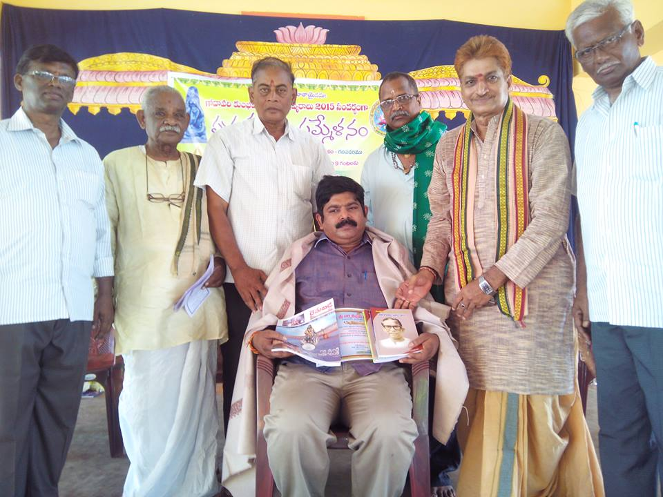 సాహితీ సన్మానం